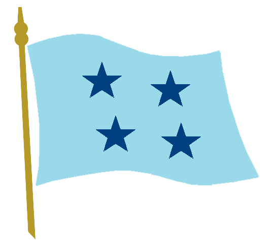 gallardete de mando